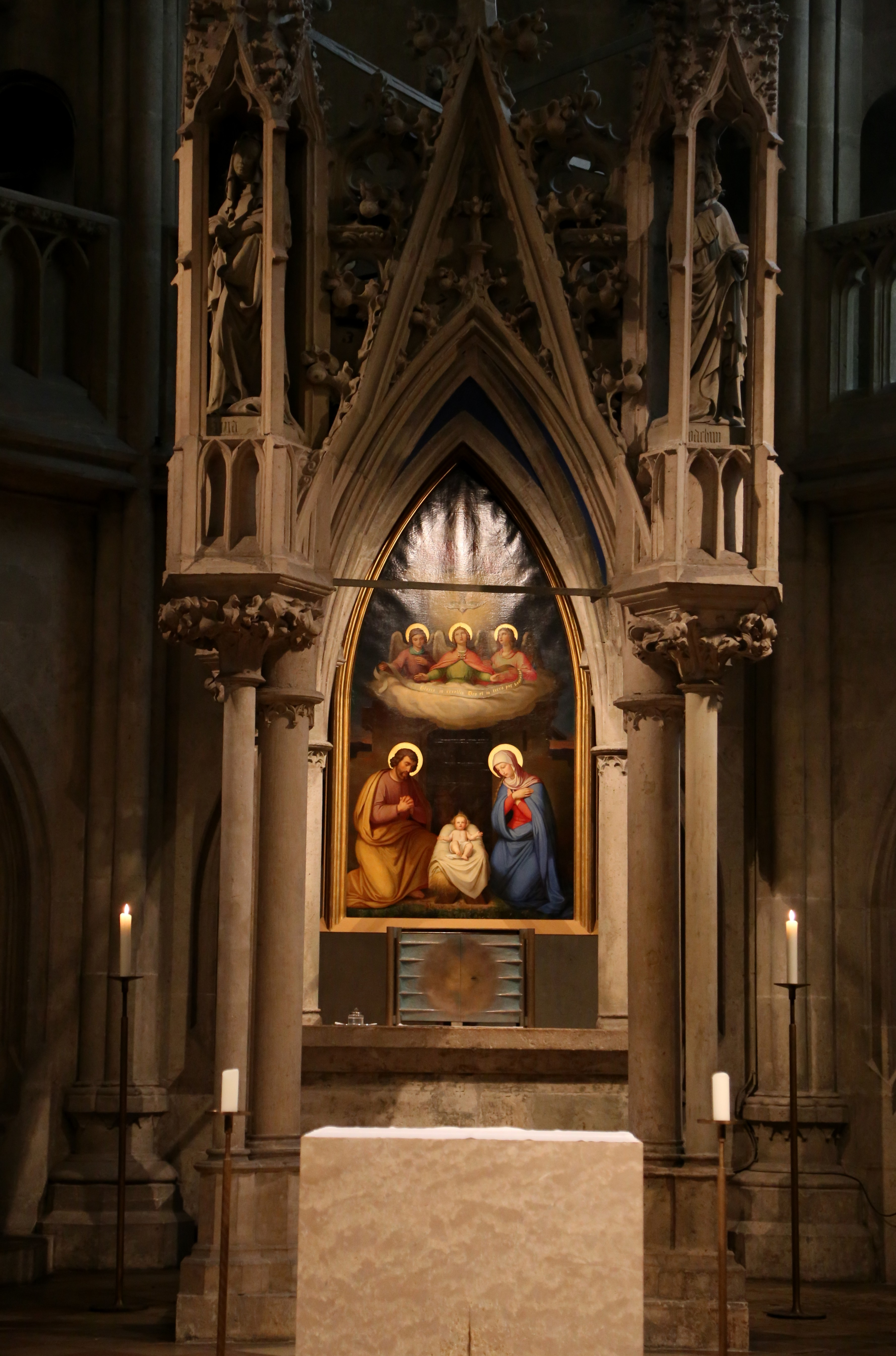 Domkirche St. Peter, dreischiffige Basilika mit drei Polygonalchören, östlichem Querhaus und Doppelturmfassade, durchgehender Hausteinbau, nach 1273 begonnen, bis um 1520 weitgehend fertiggestellt, im 15. Jahrhundert unter den Werkmeistern der Familie Roritzer, Ausbau der Türme 1859–69 durch Dombaumeister Franz Joseph von Denzinger; mit Ausstattung